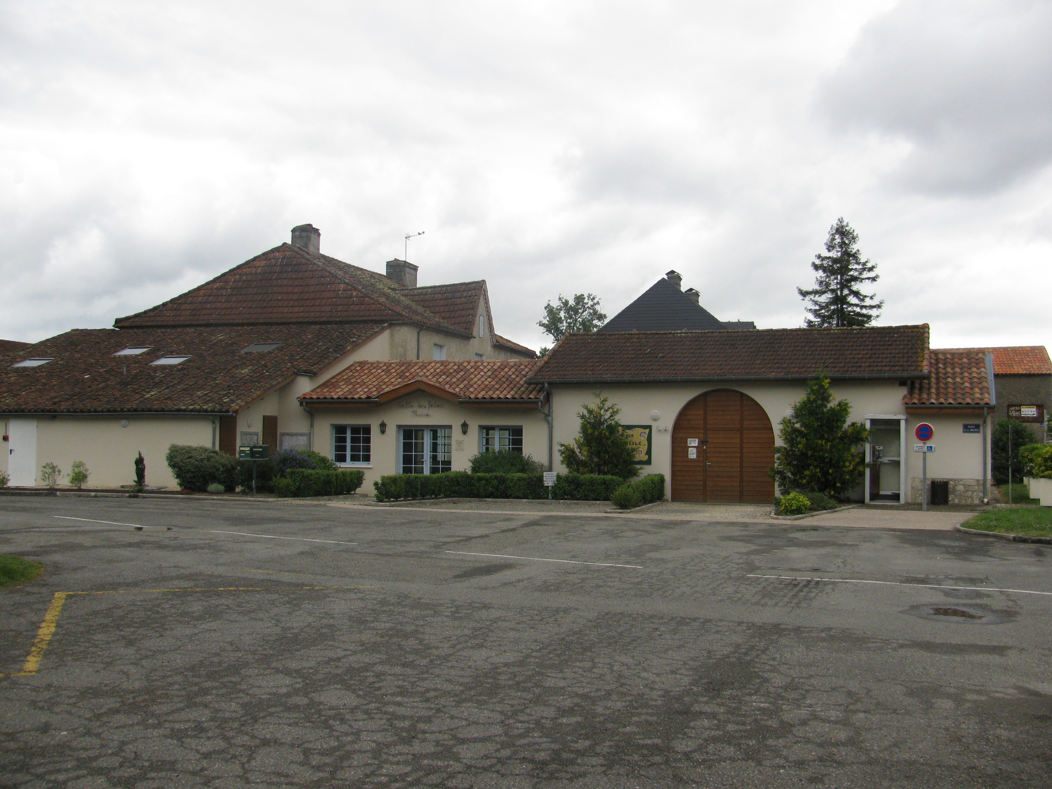 mairie de Préchac sur Adour